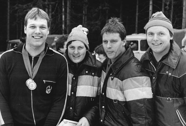 Michael Walter, Bettina Schmidt, Jörg Hoffmann, Jochen Pietzsch ADN-ZB Schaar 25.3.1984-Bez. Suhl: Mit den DDR-Meisterschaften in Oberhof ging am Wochenende die olympische Saison für die DDR-Rennschlittensportler zu Ende. DDR-Meister wurden Michael Walter (r) vom SC Traktor Oberwiesenthal, die Silbermedaillengewinnerin von Sarajevo Bettina Schmidt (2.v.l.) sowie die Doppelsitzer-Weltmeister des Vorjahres Jörg Hoffmann (l) und Jochen Pietzsch.